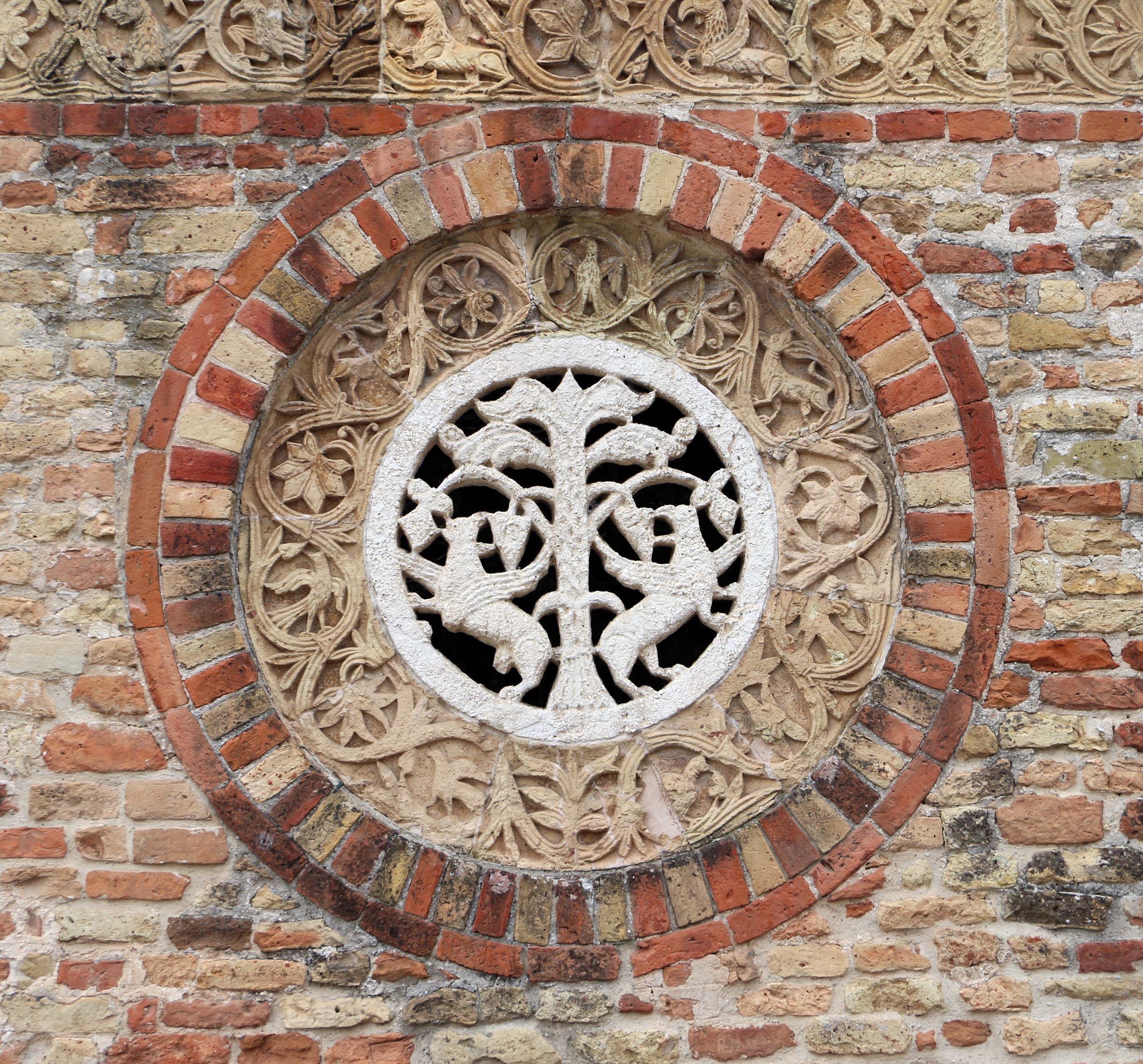 Abbazia di Pomposa This is a photo of a monument which is part of cultural heritage of Italy.